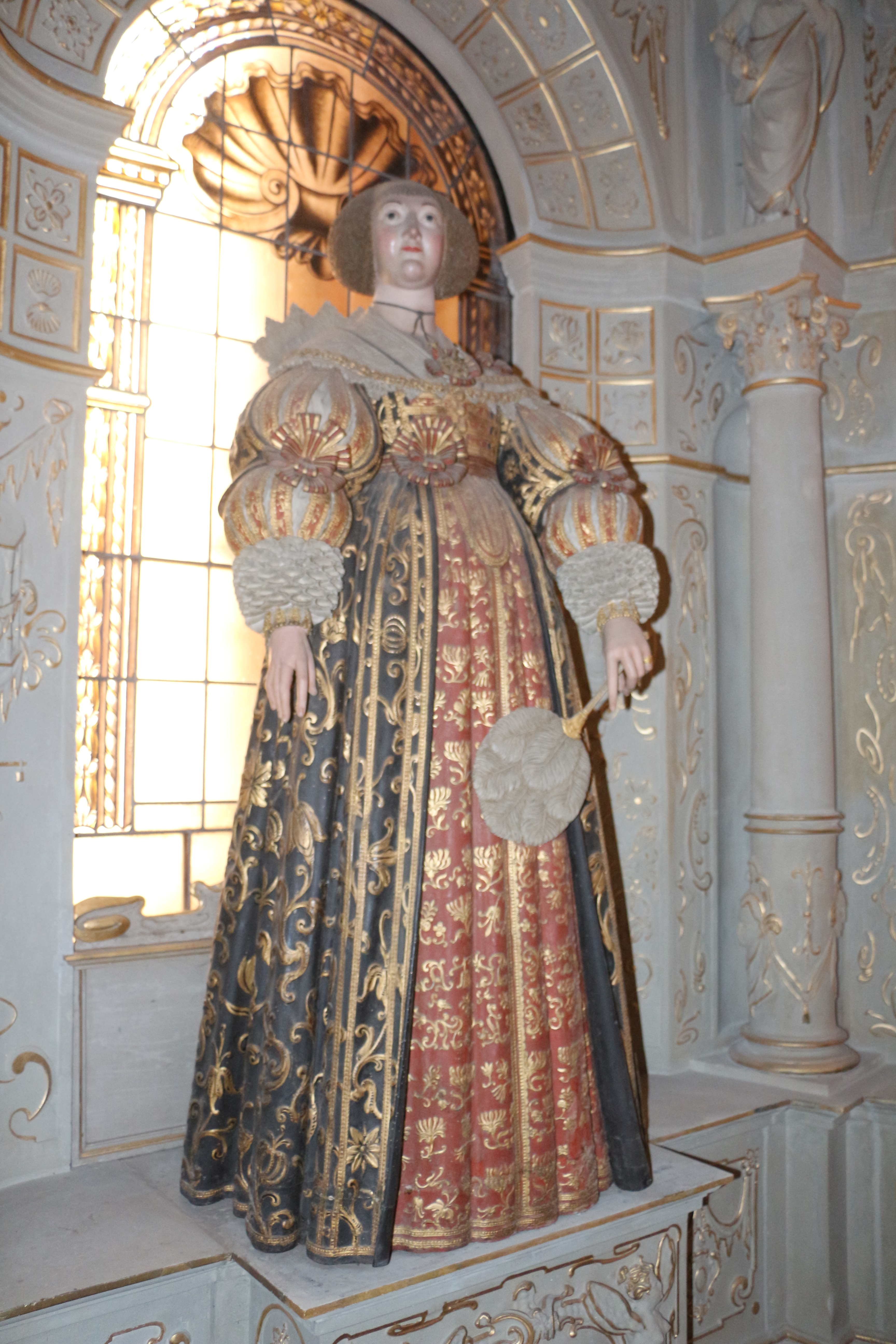 Statur der Anna Maria von Ostfriesland im Grabmal im Münster von Bad Doberan